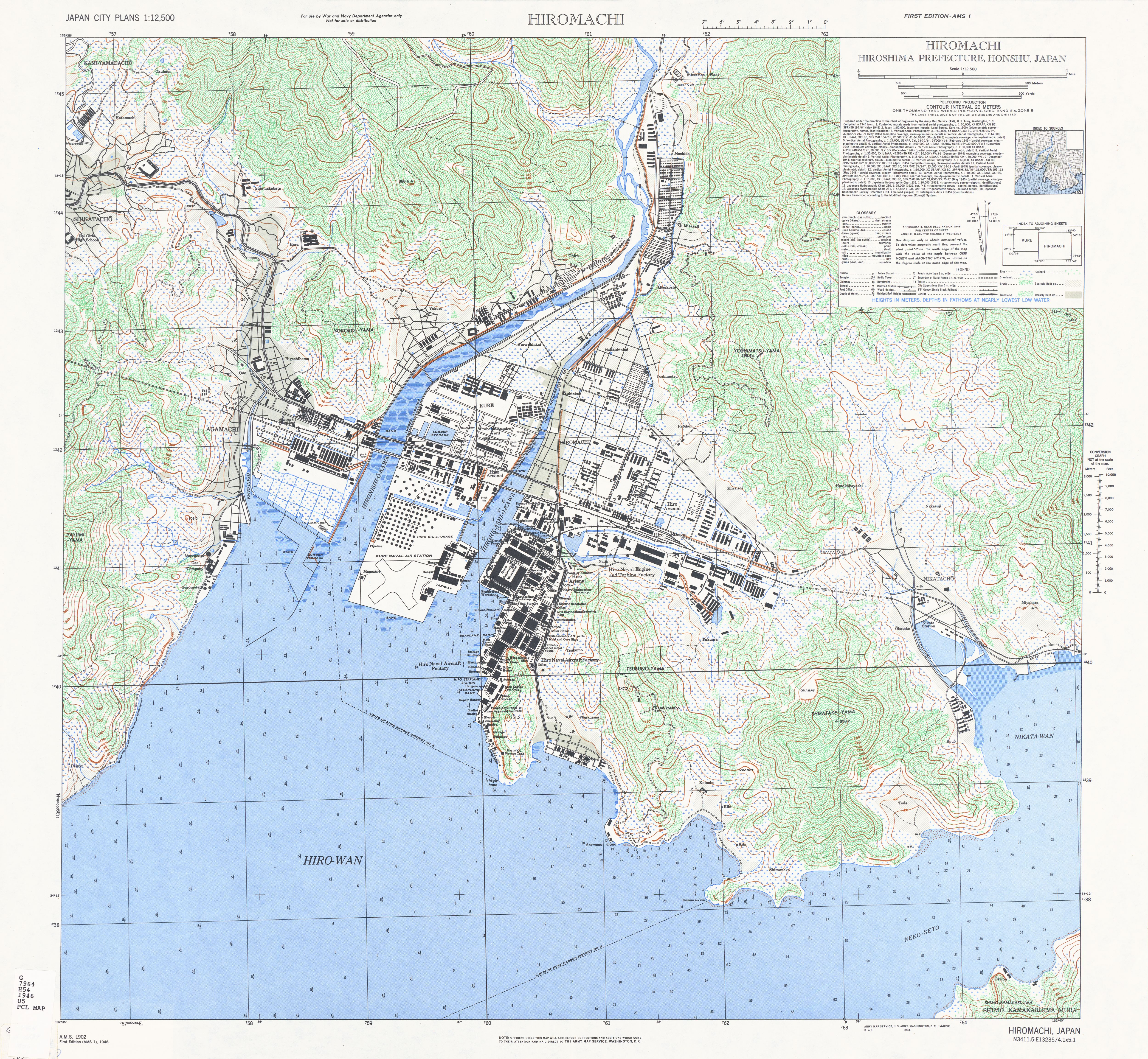 1945年アメリカ軍が作成した広島県呉市広地区の地図。一部1930年代の情報で書かれている。